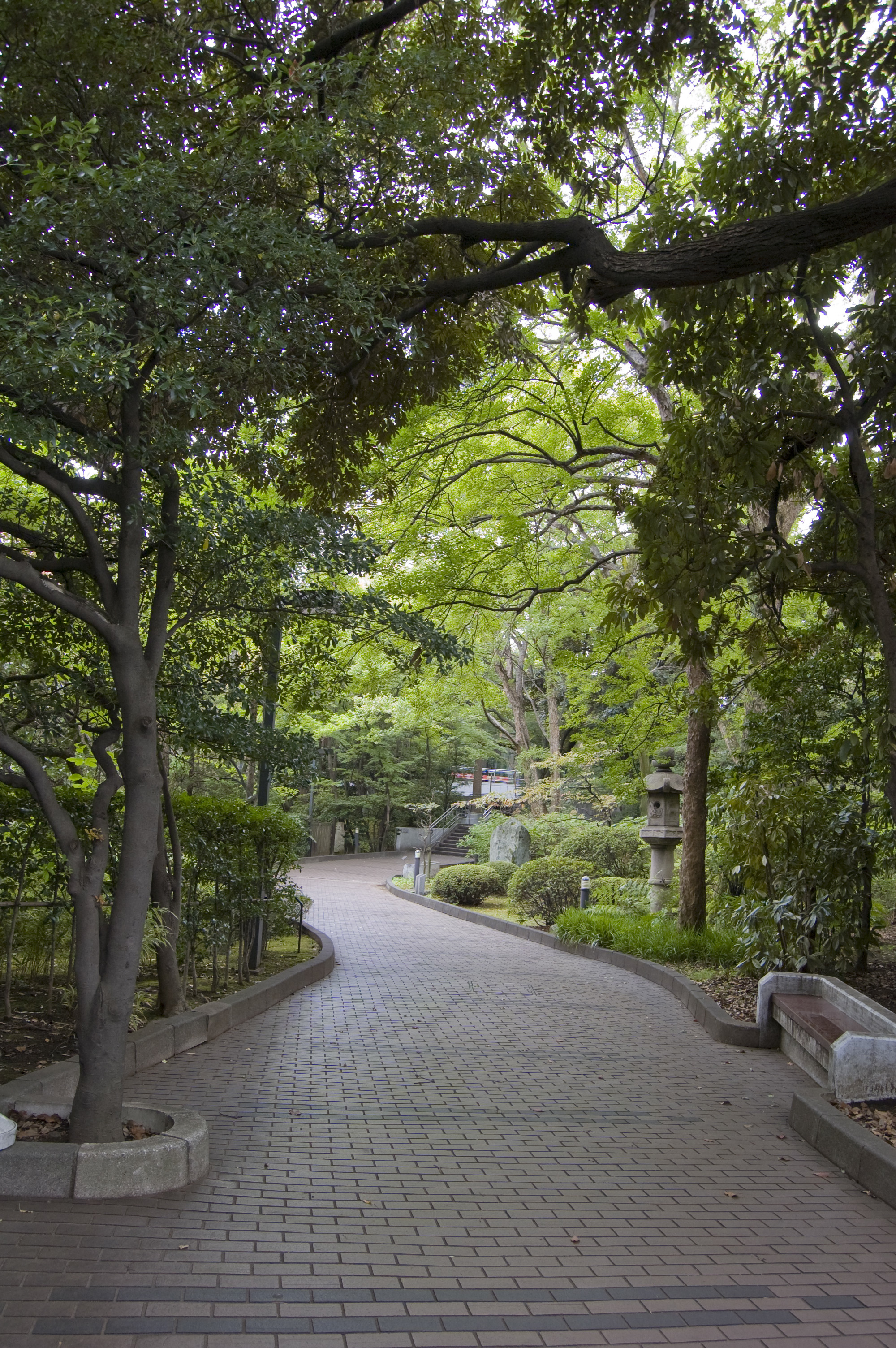 Eingang zur Garten-Mensa (Okuma Garden House)